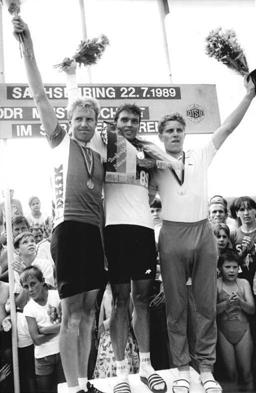 Jan Schur, Olaf Ludwig, Jens Heppner ADN-ZB Kasper 22.7.89 Bez.karl-Marx-Stadt: DDR-Meisterschaft im Straßenfahren - Auf dem tradiktionsreichen Sachsenrin wurde der Geraer Olympiasieger Olaf Ludwig (M.) DDR-Meister im Straßeneinzelfahren mit 44 s Vorsprung vor Jan Schur vom SC DHfK Leipzig (l.) und Jens Heppner (SG Wismut Gera).